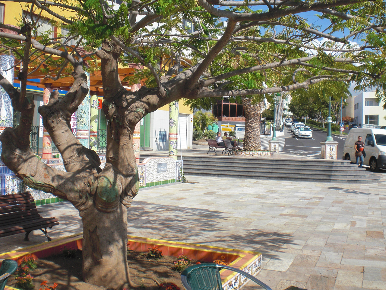 Tazacorte, Plaza San Miguel ( former Plaza 1° Mayo ) - created by Luis Morera (student of César Manrique).